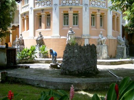 Faculde de Medicina da Bahia, in der Rotunde: Amphitheater Alfredo de Britto, aussen: Skulpturen von Professoren der FMB, geschaffen zwischen 1905 und 1909 durch den italienischen Bildhauer Pasquale de Chirico.